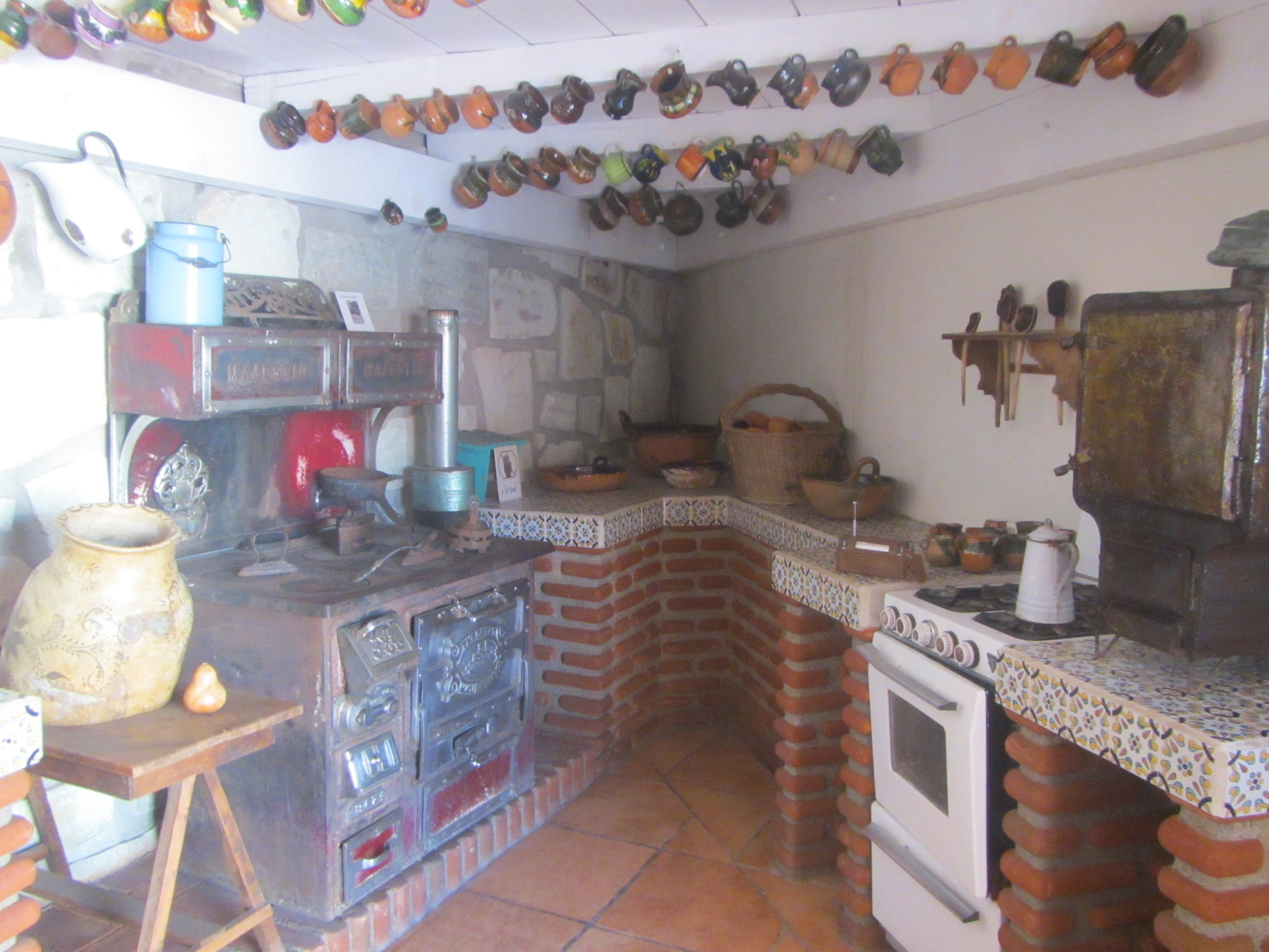 Inaugurado el 12 de octubre de 2012. En él se puede apreciar, en forma interactiva, la elaboración de este tradicional platillo, también se observarán herramientas mineras, utensilios de cocina, entre otros instrumentos vinculados al quehacer cotidiano.